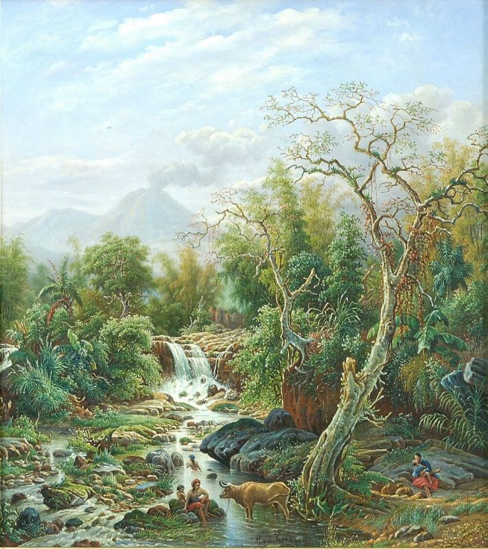 Olieverfschilderij. Rivierlandschap bij Malang